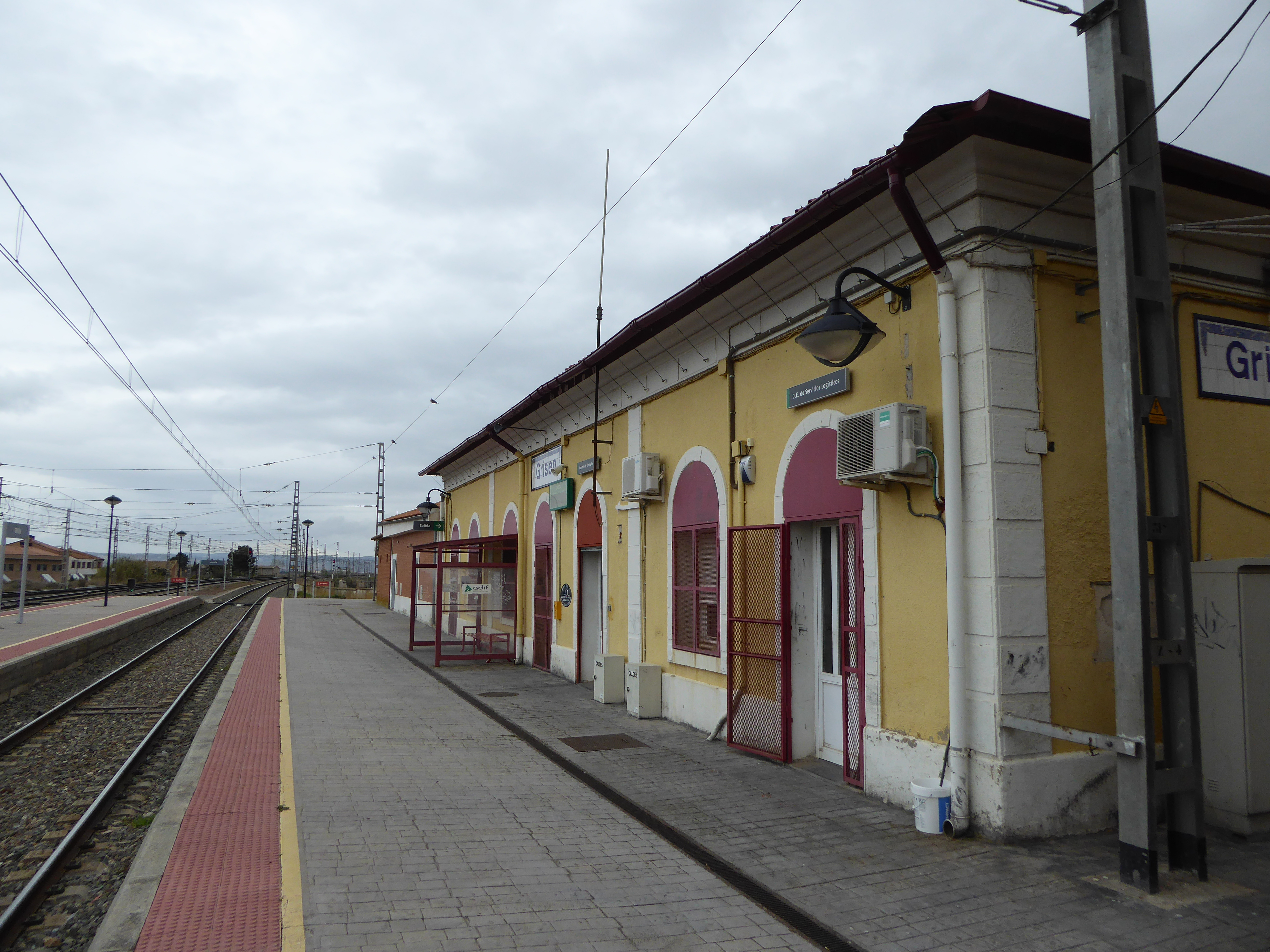 Grisén